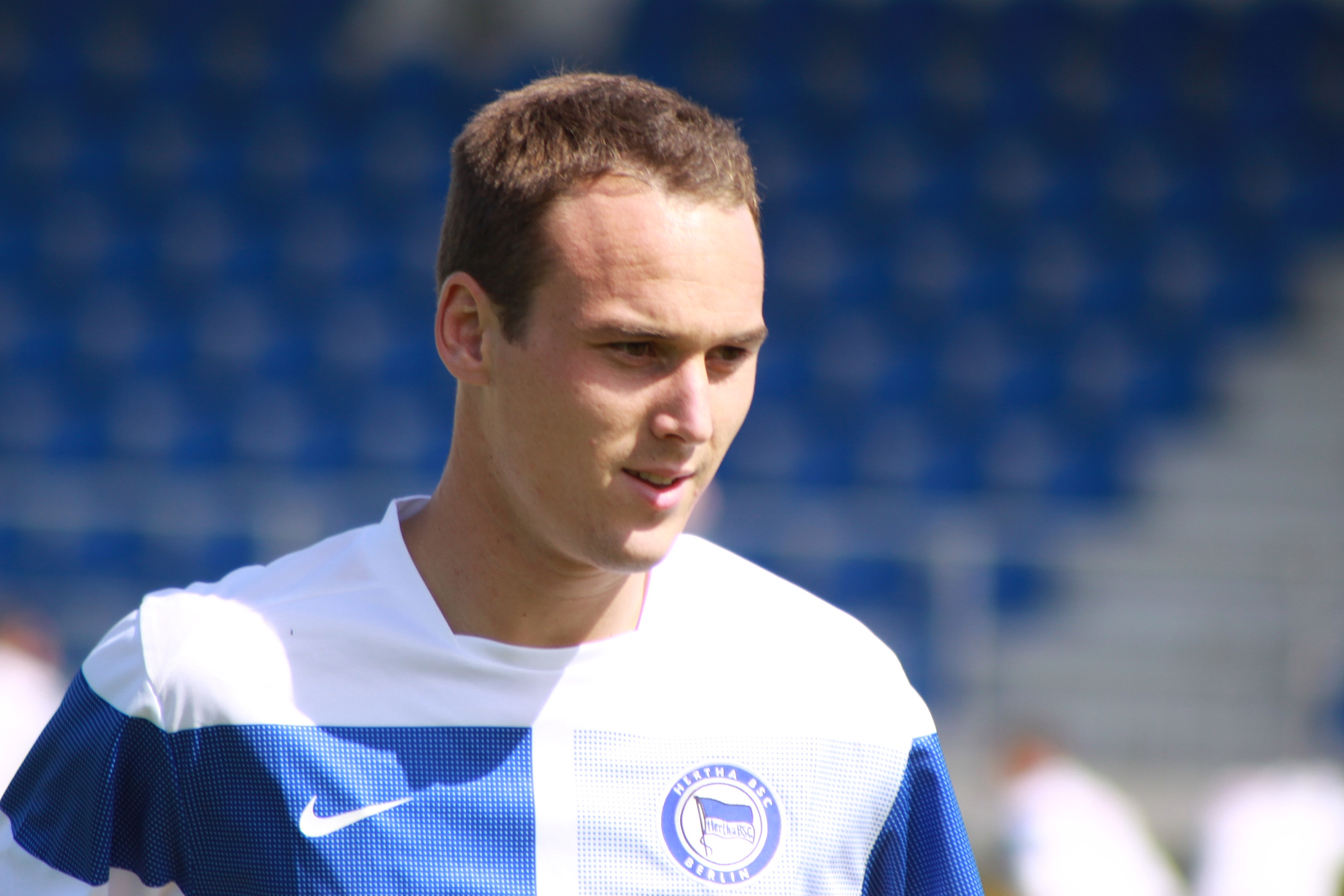 Steve von Bergen - Hertha BSC Berlin (2)